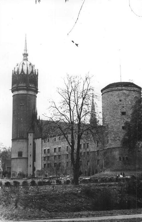 Wittenberg, Schloss, Schlosskirche Zentralbild Quasch. 20.10.1952 Zur 450- Jahrfeier der Martin- Luther- Universität Halle-Wittenberg vom 18. bis 25.10.1952 Während der Festwoche haben die auswärtigen Gäste die Gelegenheit, die historischen Stätten der alten Lutherstadt Wittenberg zu besichtigen. UBz: Blick auf das Schloß und die Schloßkirche zu Wittenberg. Das Schloß wurde 1490 - 1525 anstelle der Burg der Askanier erbaut. Es diente gleichzeitig als Wehrbau und hat teilweise bis zu zwei Metern dicke Mauern.